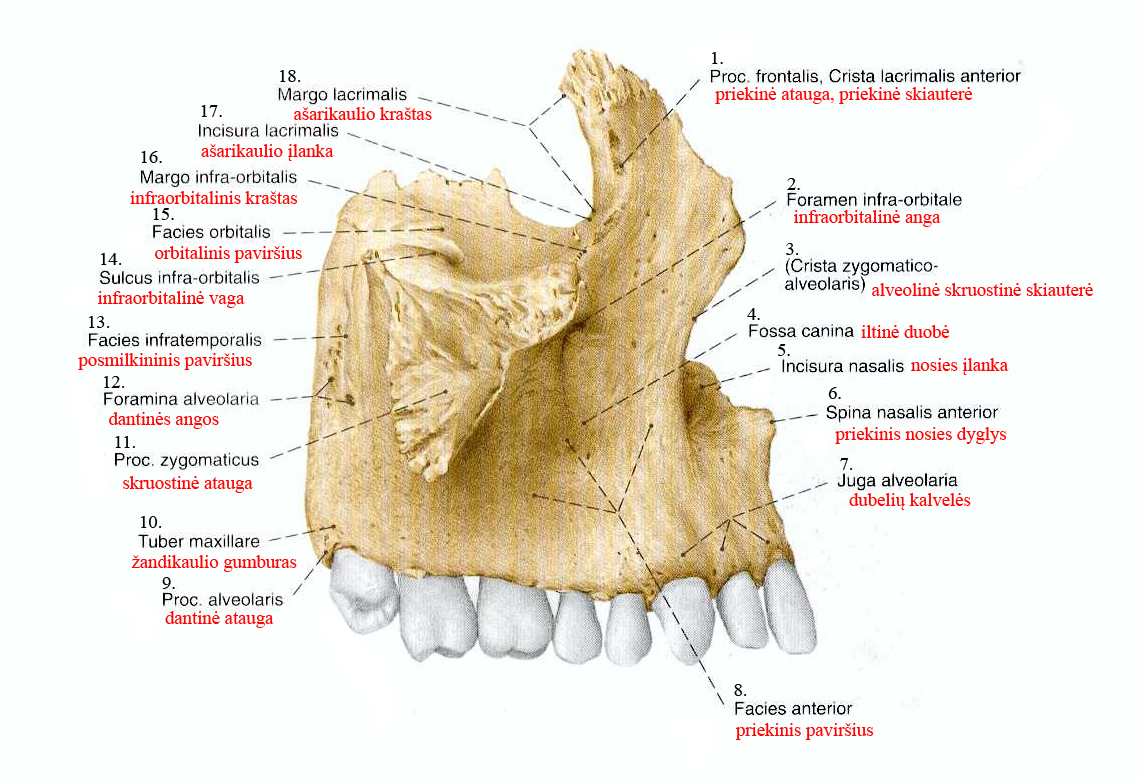 veido dalies kaulas